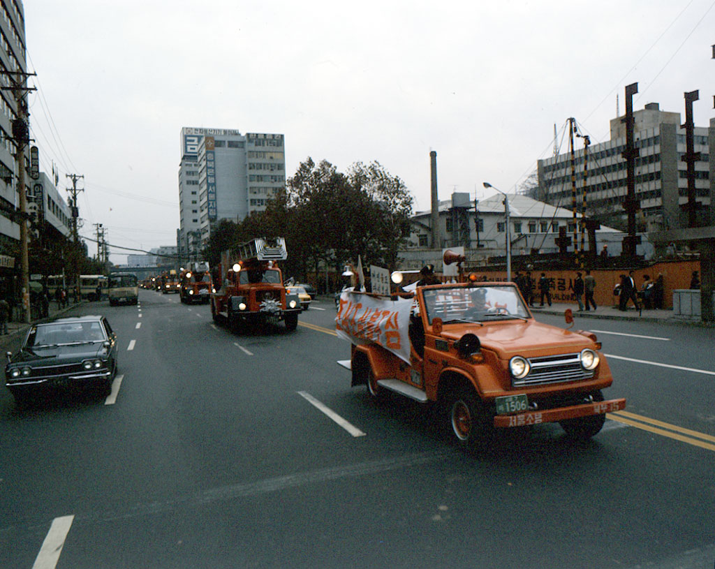 최초 국산소방차 인수식(The First Domestic-made Fire Trucks Ceremony)이 1977년 3월 28일 여의도광장에서 거행되었다. 김치열 내무부 장관을 비롯한 관계자들이 참석한 자리에서 소방차 36대, 화학차 6대에대한 성능시험이 있었다. 내무부에서 소방차의 부족과 장비의 근대화를 달성하기 위하여 1976년 9월 우리나라 최초로 48대의 국산 소방차를 하동환 자동차 공업주식회사에 발주한 것이 결실을 맺은 것이다. 그때까지 각종 소방차량을 외국에만 의존해 오던 것을 국산화 소방차로 대체하게된 계기가 되었다.